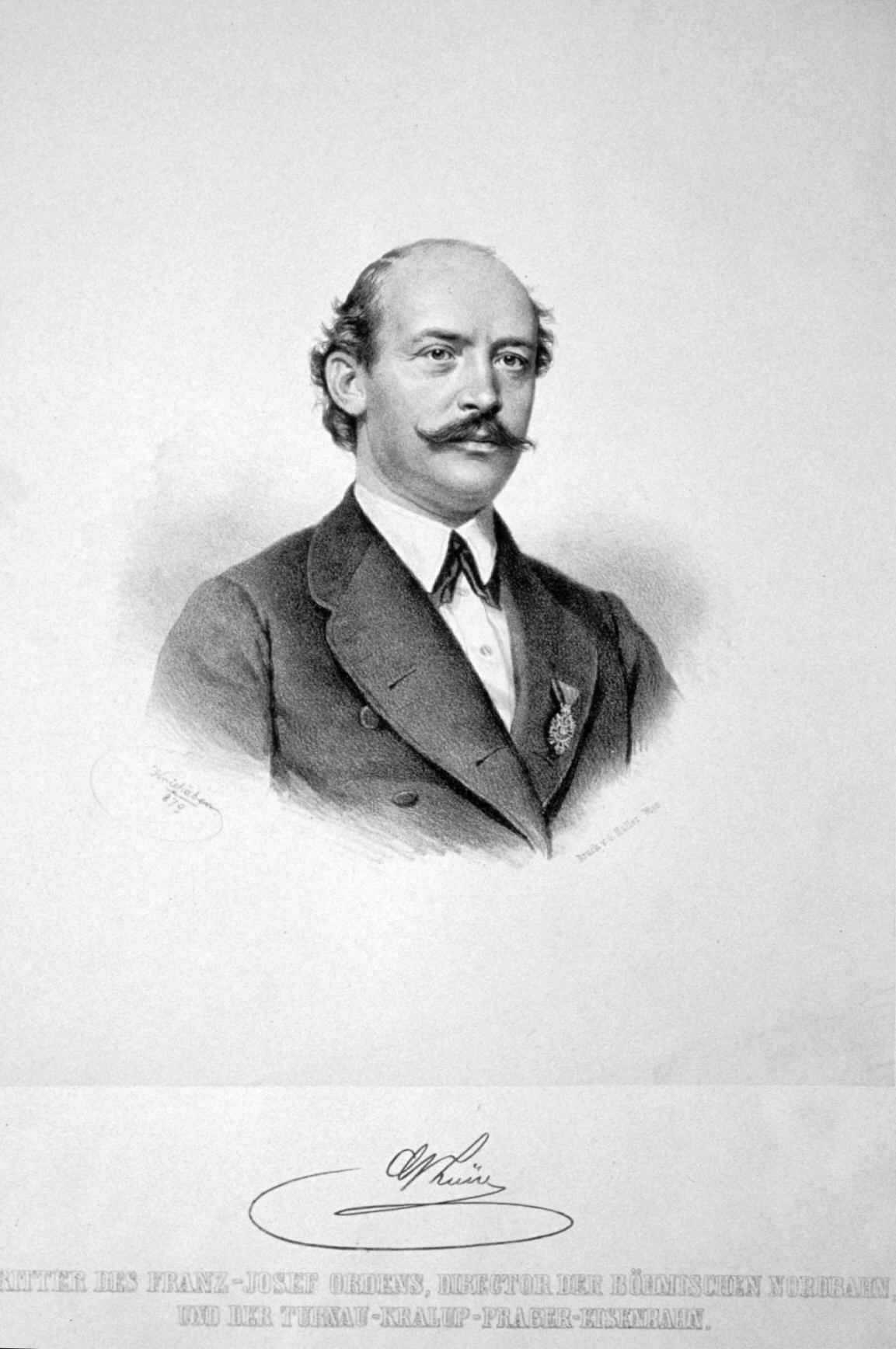 Georg Löw (1830-1887) Ritter des Franz-Joseph Ordens, Director der böhmischen Nordbahn und der Turnau-Kralup-Prager Eisenbahn. Lithographie von Josef Kriehuber, 1870